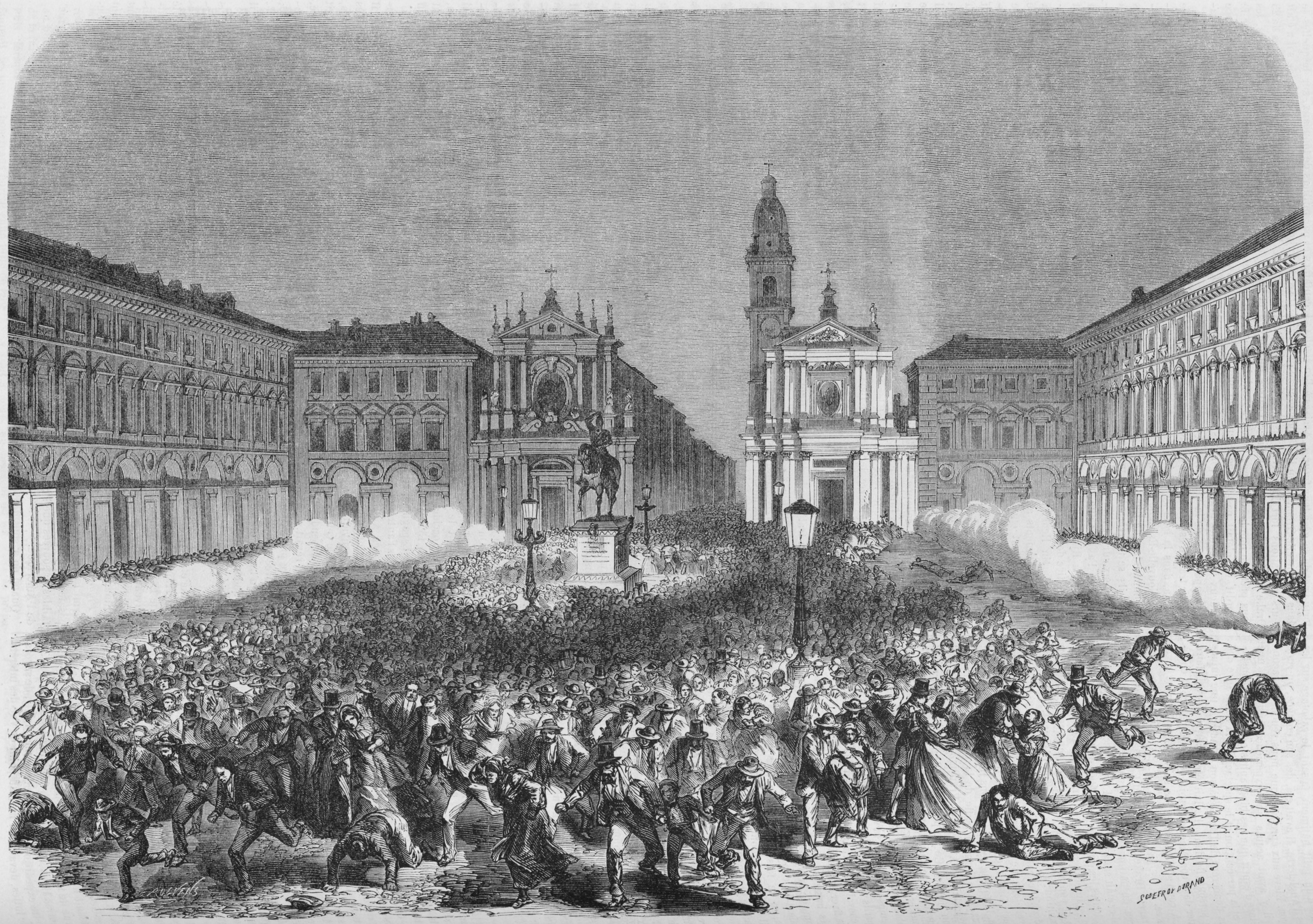 Scontri di Piazza San Carlo a Torino il 22 settembre 1864